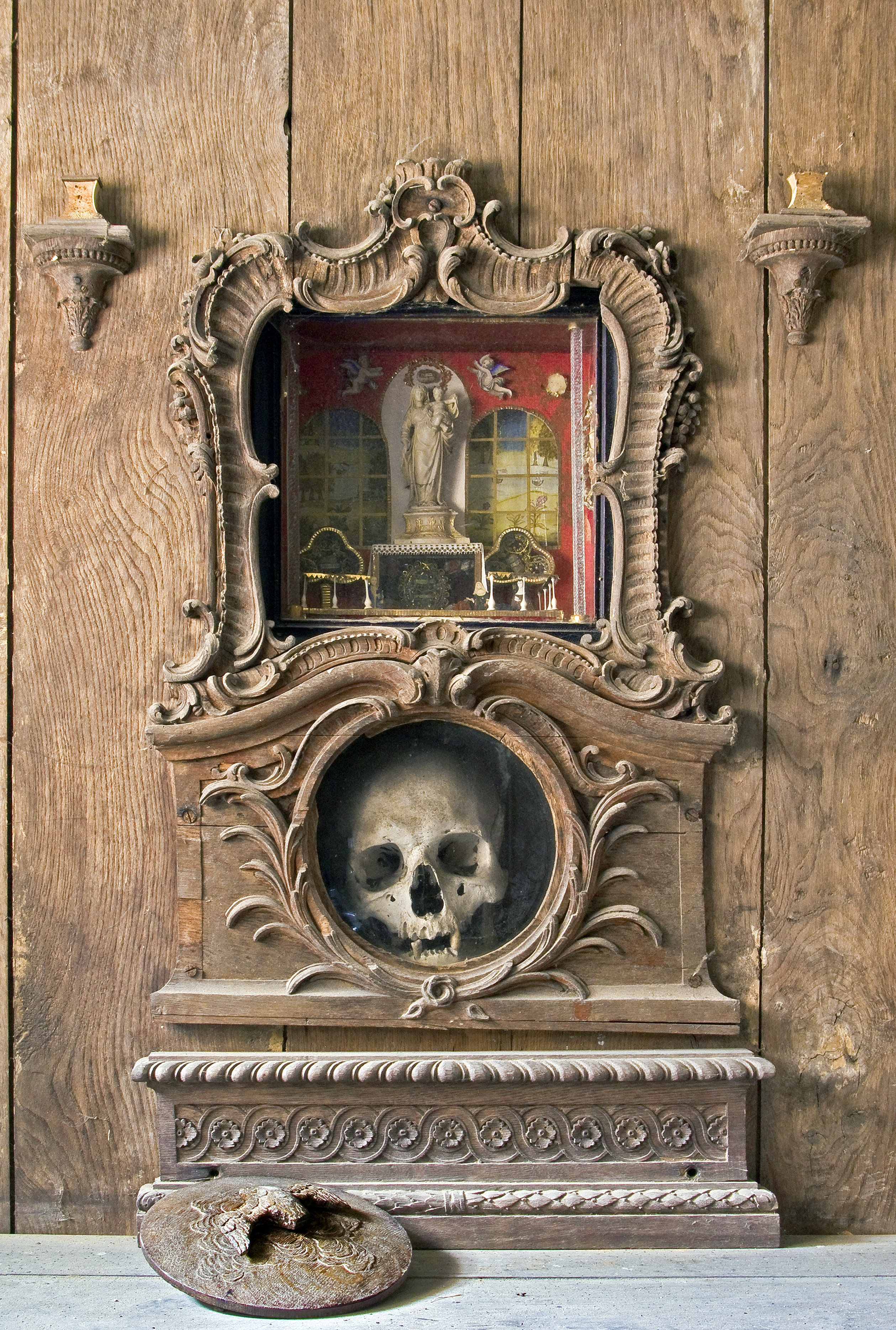 Oratoire du « Président d'Acquigny » se trouvant au-dessus de la sacristie de l'église d'Acquigny (France - Normandie - Eure)